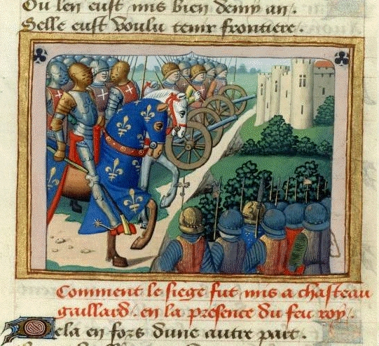 Le siège de Château Gaillard, par Martial d'Auvergne, enluminure issue de l'ouvrage Vigiles de Charles VII, Paris, France, XV°siècle.